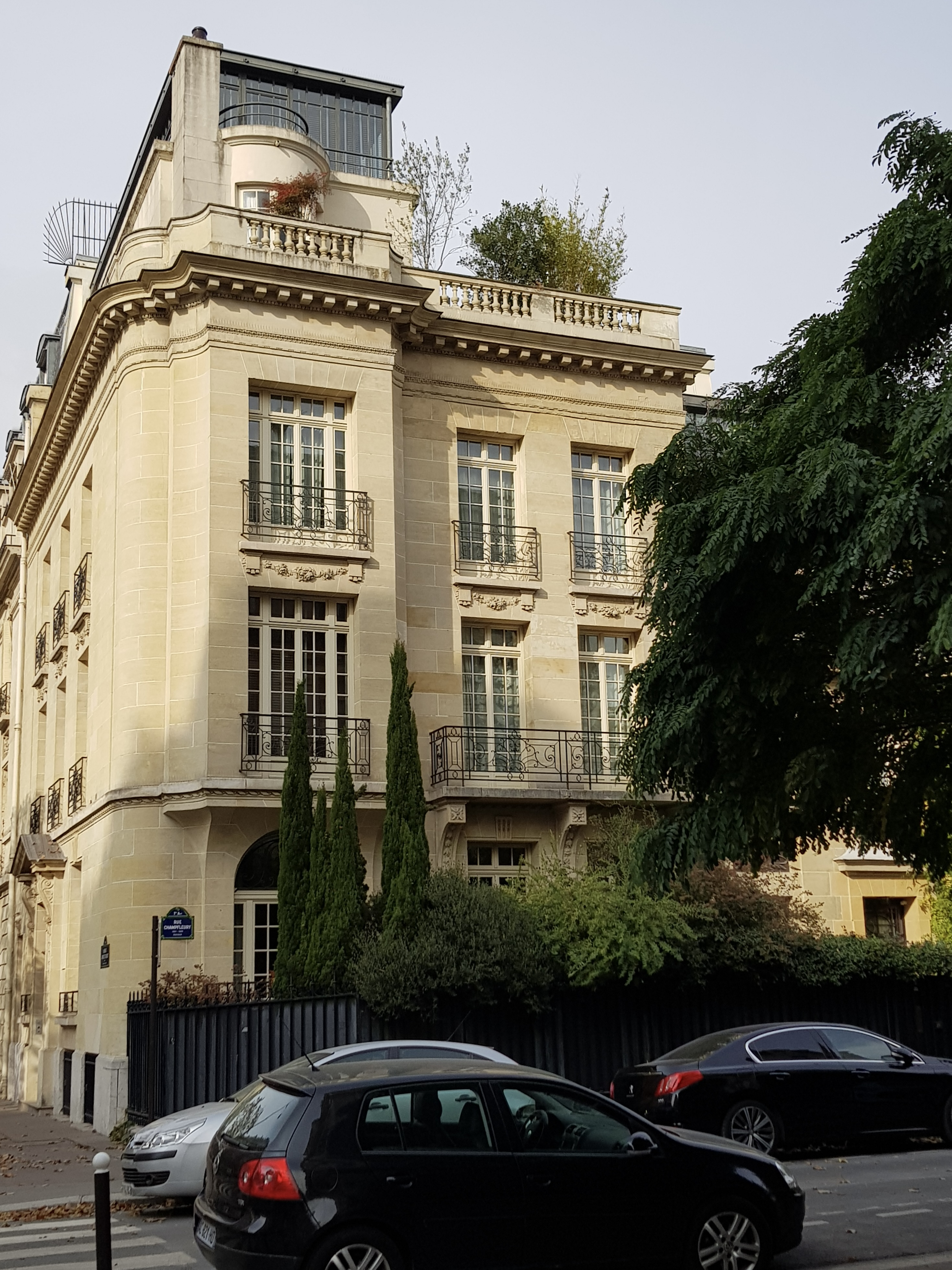 Immeuble à l'angle de la rue Champfleury et de l'avenue Charles-Floquet, Paris 7e.